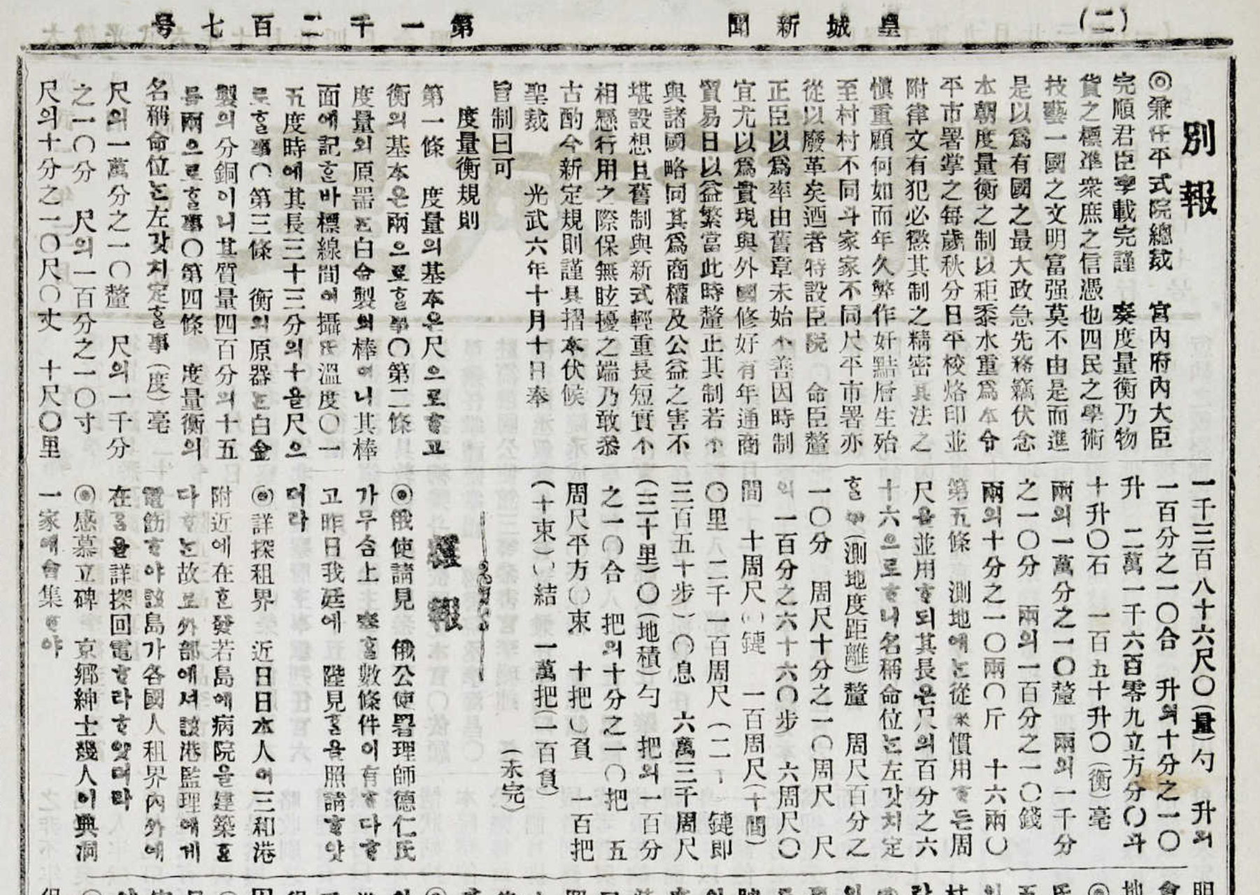 1902년 황성신문에 실린 대한제국 도량형규칙. 1척을 33분의 10미터(약 30.30cm)로 정한다. 1냥을 400분의 15킬로그램(정확히 37.5g)으로 정한다. 측지에는 주척을 병용하되 주척은 척의 100분의 66(정확히 20cm)으로 정한다, 1파는 5주척 평방(정확히 1제곱미터)로 정한다 등의 내용 포함. 구체적 내용은 아래와 같음. 1조에서 5조까지 나와 있으며 6조 이하는 미포함. 別 報 ◎兼任平式院總裁 宮內府內大臣完順君臣李載完謹 奏度量衡乃物貨之標凖衆庶之信憑也四民之學術技藝一國之文明富强莫不由是而進是以爲有國之最大政急先務竊伏念本朝度量衡之制以秬黍水重爲本令平市署掌之每歲秋分日平校烙印並附律文有犯必懲其制之精密其法之愼重顧何如而年久弊作奸黠層生殆至村村不同斗家家不同尺平市署亦從以廢革矣迺者特設臣院 命臣釐正臣以爲率由舊章未始不善因時制宜尤以爲貴現與外國修好有年通商貿易日以益繁當此時釐正其制若不與諸國略同其爲商權及公益之害不堪設想且舊制與新式輕重長短實不相懸行用之際保無眩擾之端乃敢叅古酌今新定規則謹具摺本伏候聖裁 光武六年十月十日奉旨制曰可 度量衡規則 第一條 度量의 基本은 尺으로고衡의 基本은 兩으로 事○第二條度量의 原噐 白金製의 棒이니 其棒面에 記바 標線間이 攝氏溫度○一五度時에 其長三十三分의 十을 尺으로 事○第三條 衡의 原器 白金製의 分銅이니 其質量四百分의 十五를 兩으로 事○第四條 度量衡의名稱命位 左갓치 定 事（度)毫尺의 一萬分之一○釐 尺의 一千分之一○分 尺의 一百分之一○寸尺의 十分之一○尺○丈 十尺○里一千三百八十六尺○（量)勺 升의一百分之一○合 升의 十分之一○升 二萬一千六百零九立方分○斗十升○石 一百五十升○（衡)毫兩의 一萬分之一○釐 兩의 一千分之一○分 兩의 一百分之一○錢兩의 十分之一○兩○斤 十六兩○第五條 測地에 從來慣用든 周尺을 並用되 其長은 尺의 百分之六十六으로니 名稱命位 左갓치 定 事（測地度距離)釐 周尺百分之一○分 周尺十分之一○周尺 尺의 一百分之六十六○步 六周尺○間 十周尺○鏈 一百周尺（十間)○里 二千一百周尺(二 鏈即三百五十步）○息 六萬三千周尺（三十里）○（地積)勺 把의 一百分之一○合 把의 十分之一○把 五周尺平方○束 十把○負 一百把（十束)○結 一萬把（一百負) （未完）